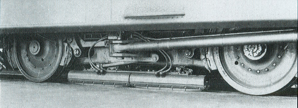 Maschinendrehgestell des SVT Kruckenberg auf einer Werksaufnahme von Westwaggon